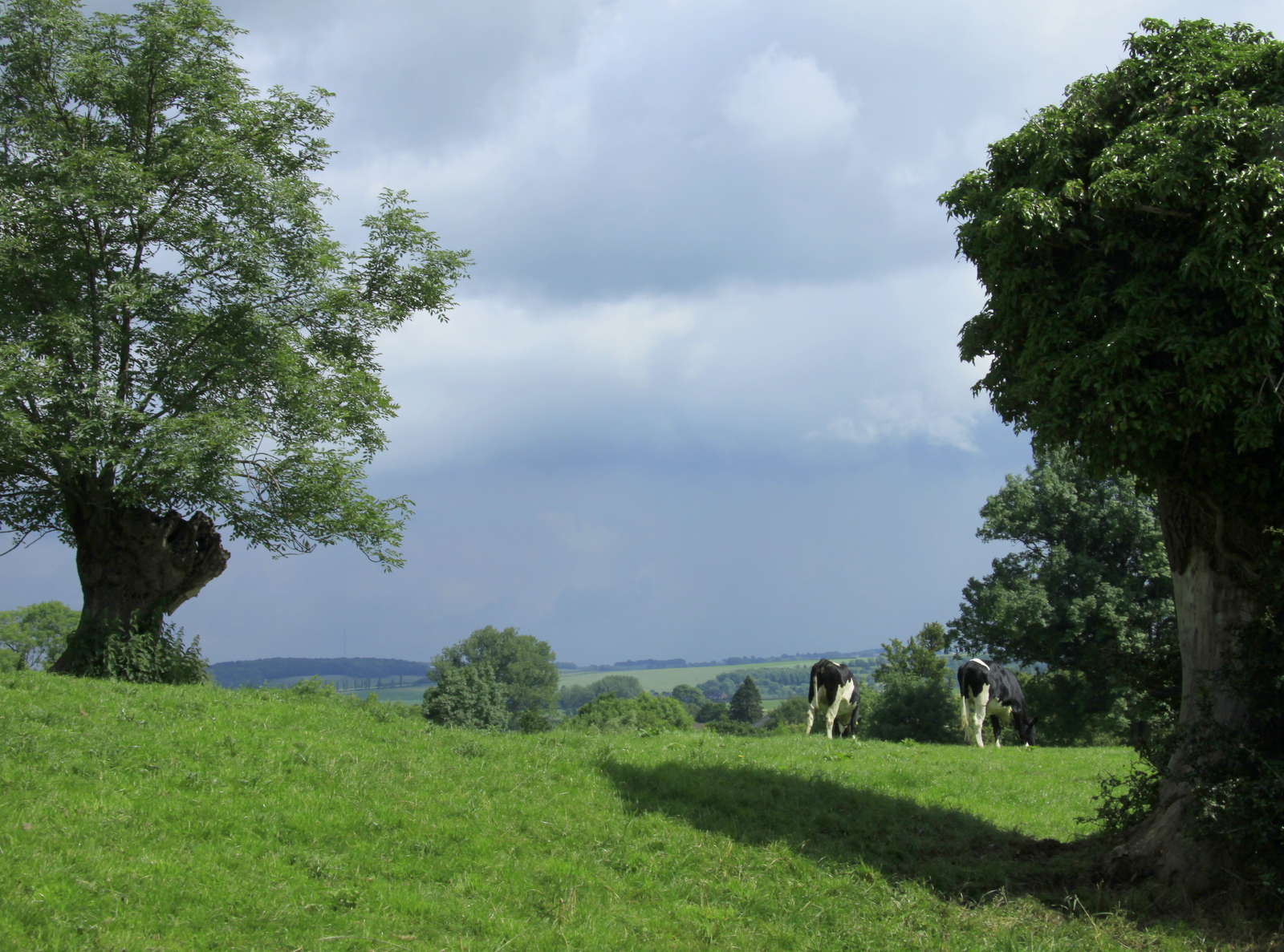 Het natuurgebied bij het mooie buurtschap 't Hofke bij Mechelen in Limburg bestaat uit hellingen met unieke kalkgrslanden.